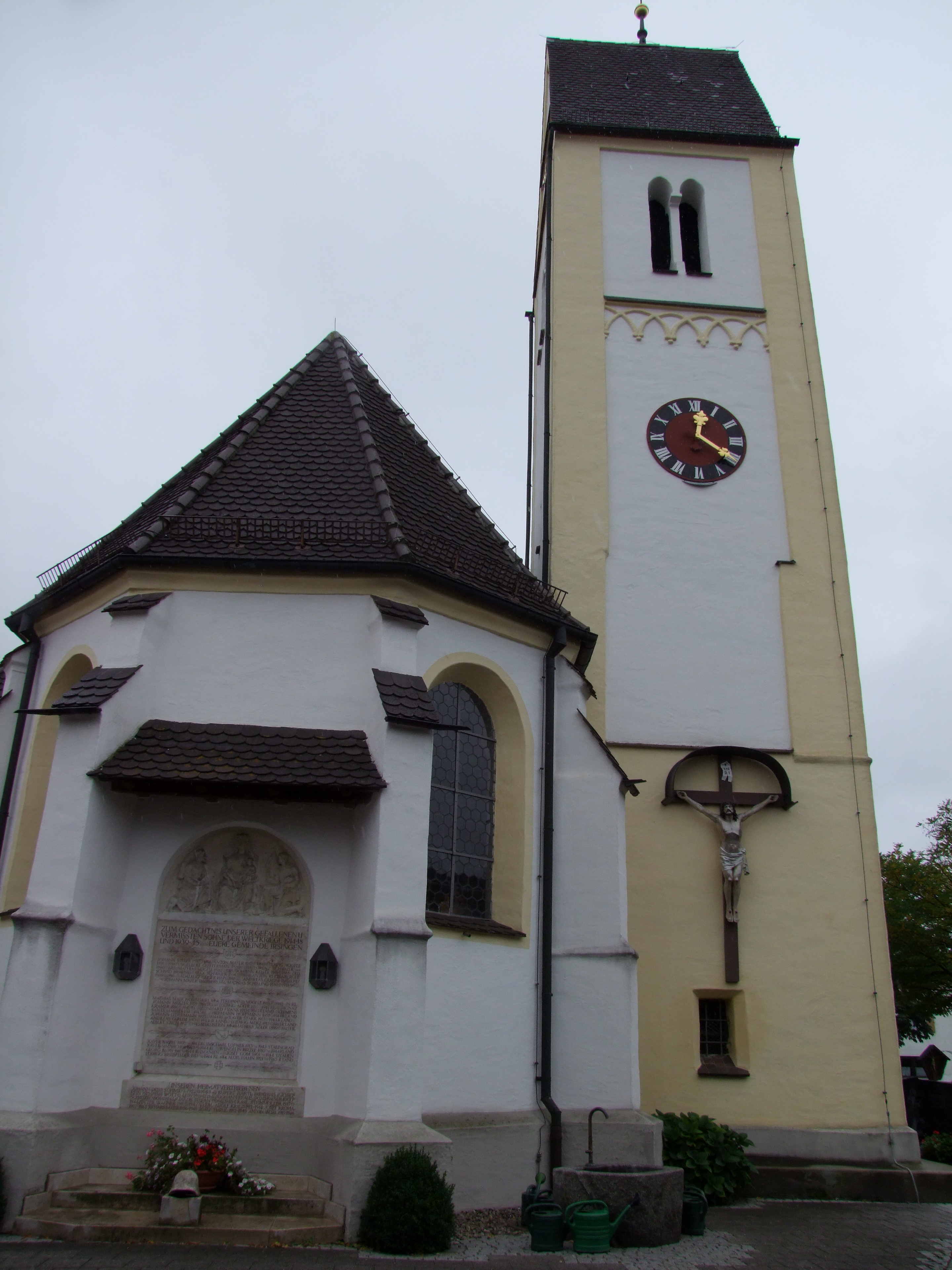 St. Margareta im oberschwäbischen Irsingen, einem Ortsteil von Türkheim in Bayerisch/Schwaben